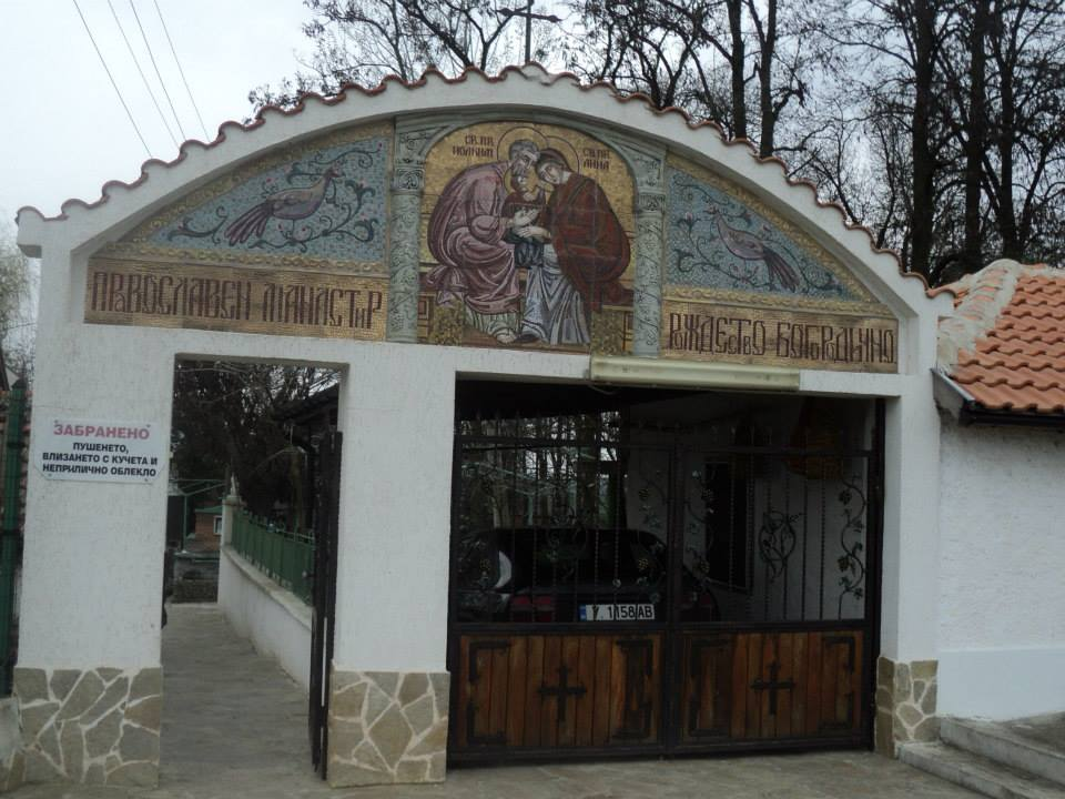 Кабиле